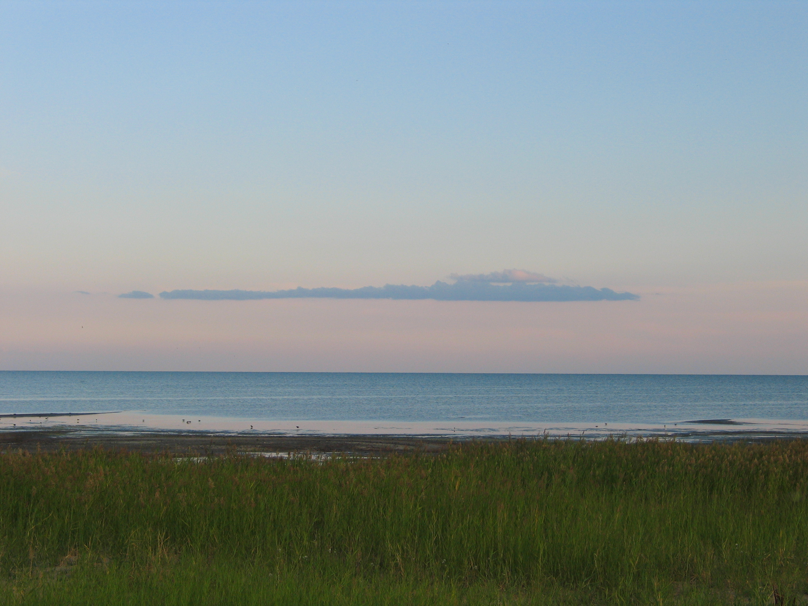 Вид на Кулундинское озеро (Алтайский край) с севера (1,5 км от деревни Знаменка), крайняя северная точка озера.